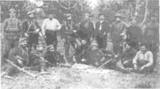 Стефан Чавдаров.